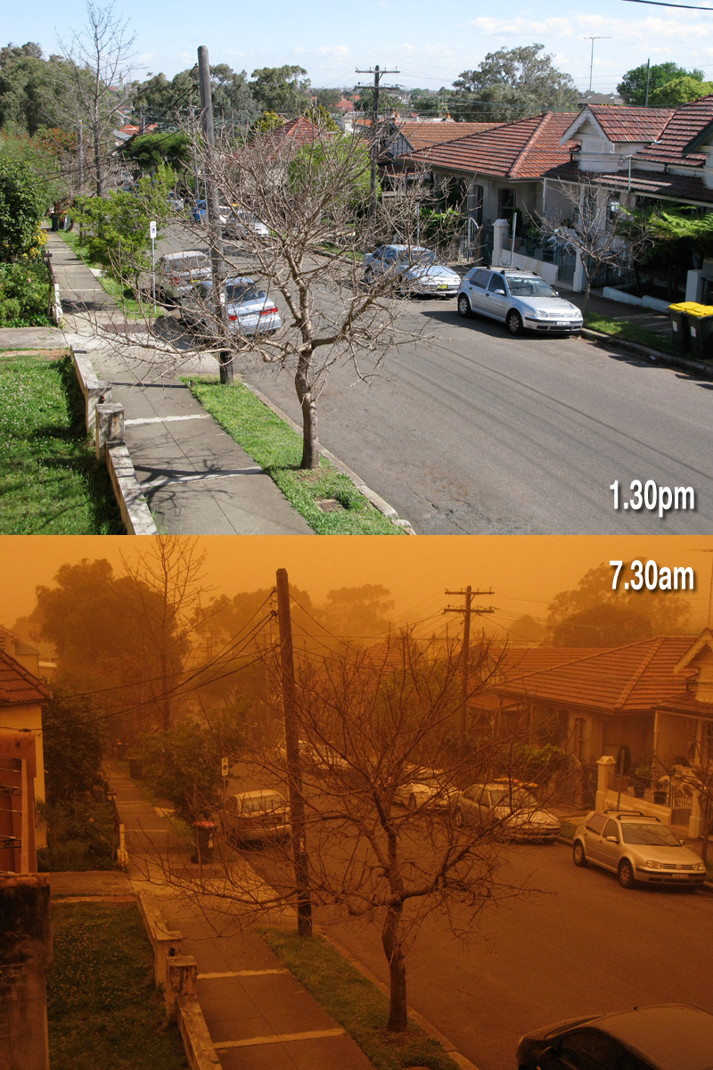 Post & Mid dust storm